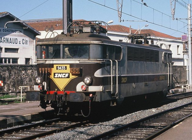 SNCF BB 9435 en livrée Arzens pour BB Jacquemin